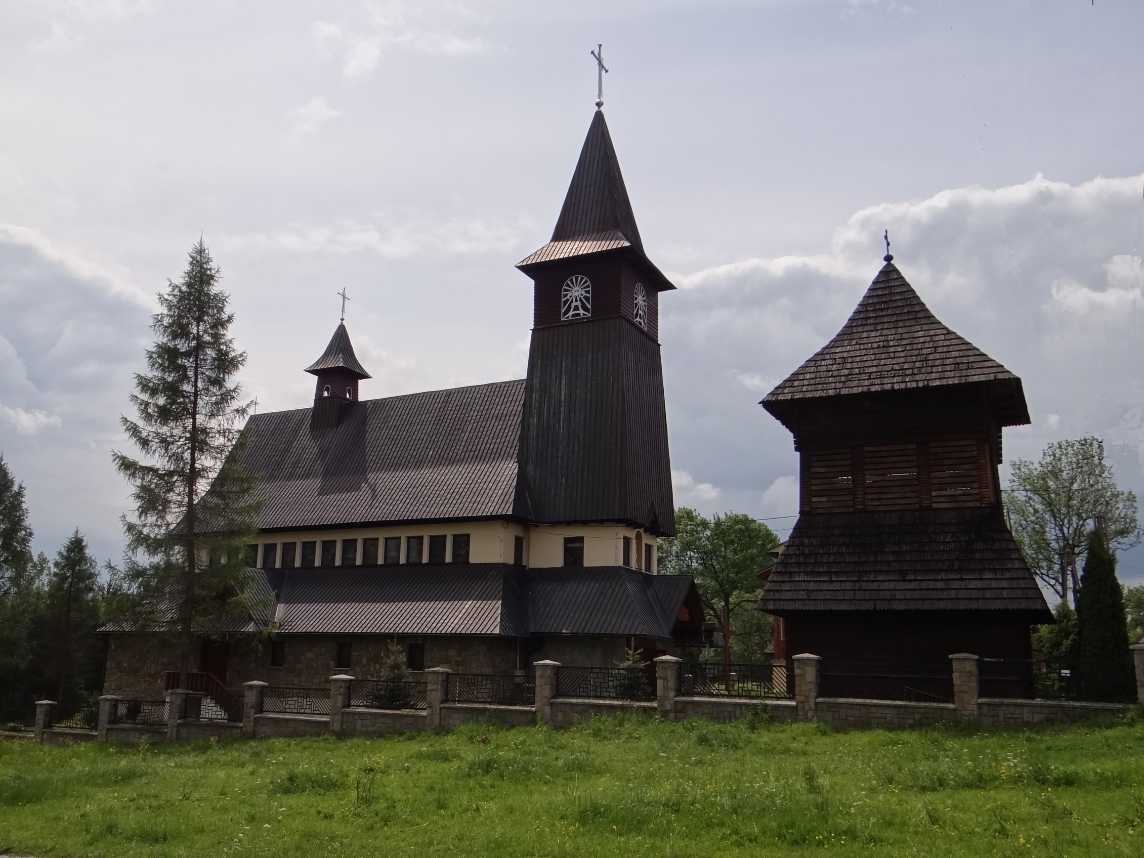 Kościół w Rogoźniku